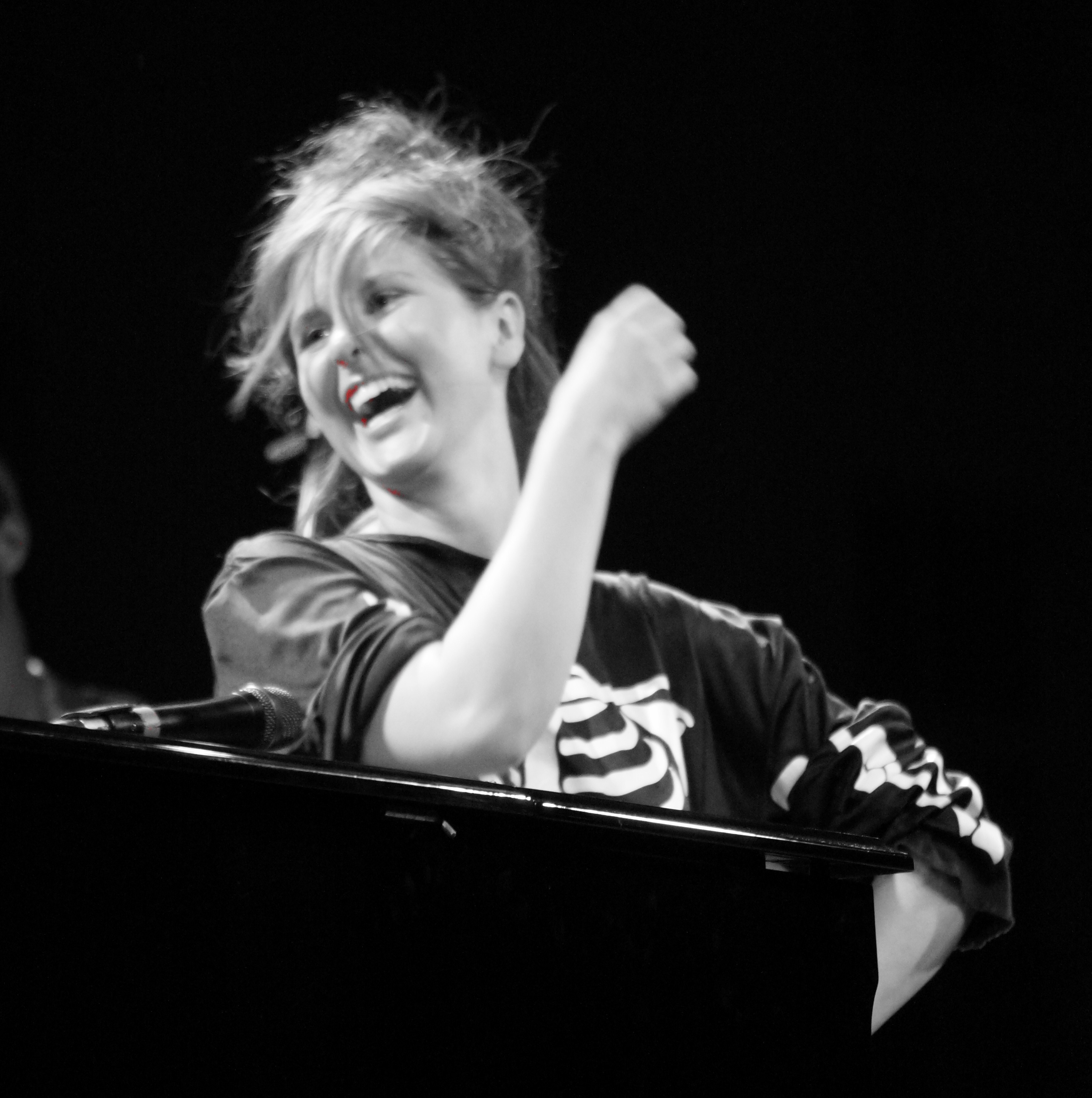 lors de Musique d'ici et d'ailleurs 2014.